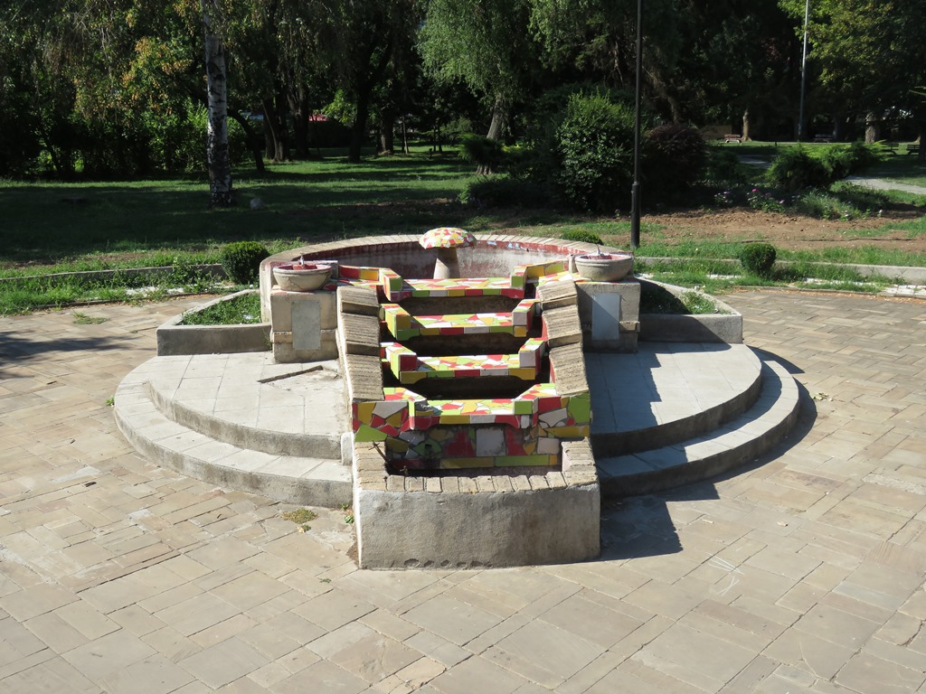 Park Čair, Niš, Srbija